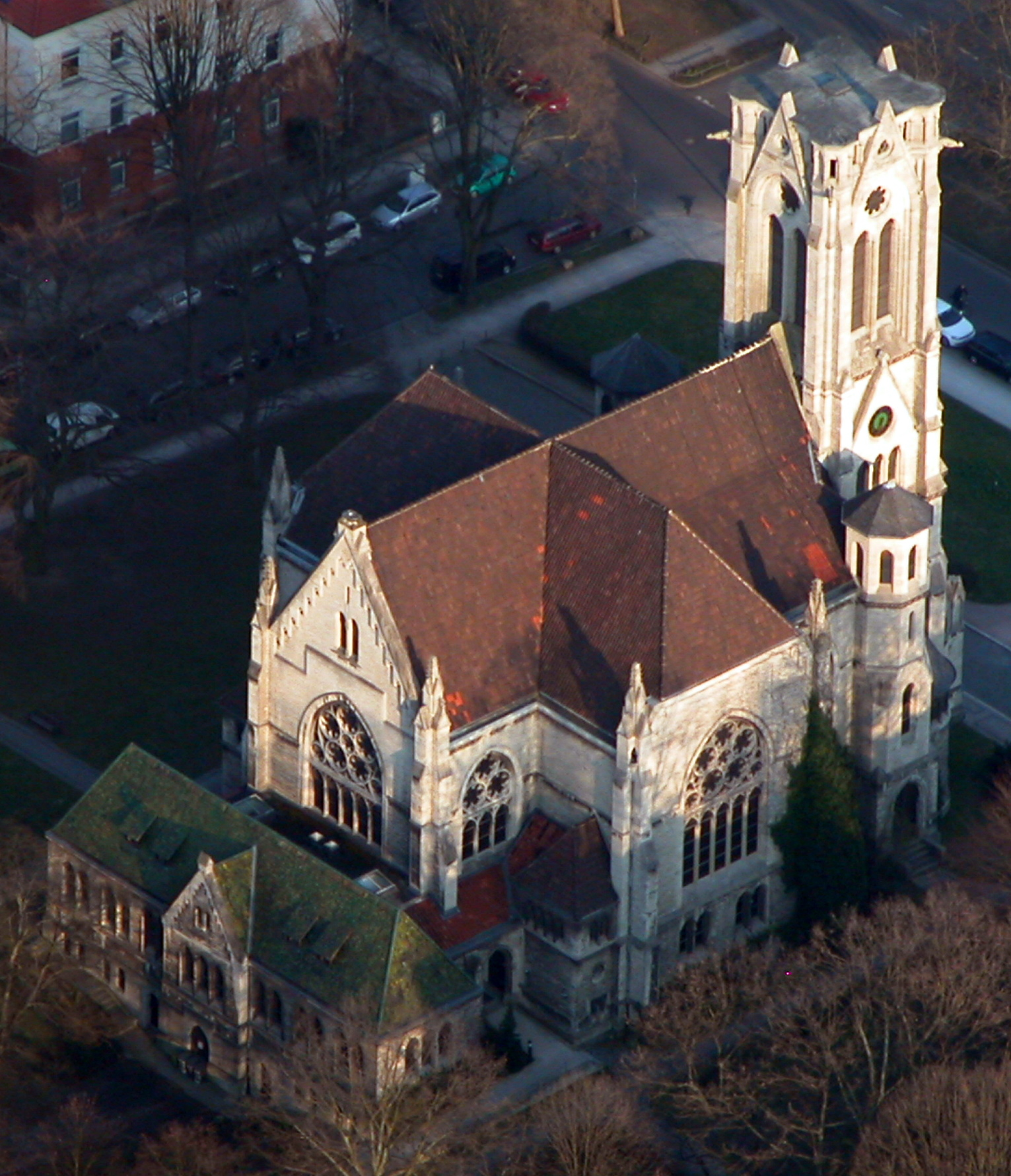 Luftaufnahme Braunschweig: Paulikirche von Nordwesten gesehen.